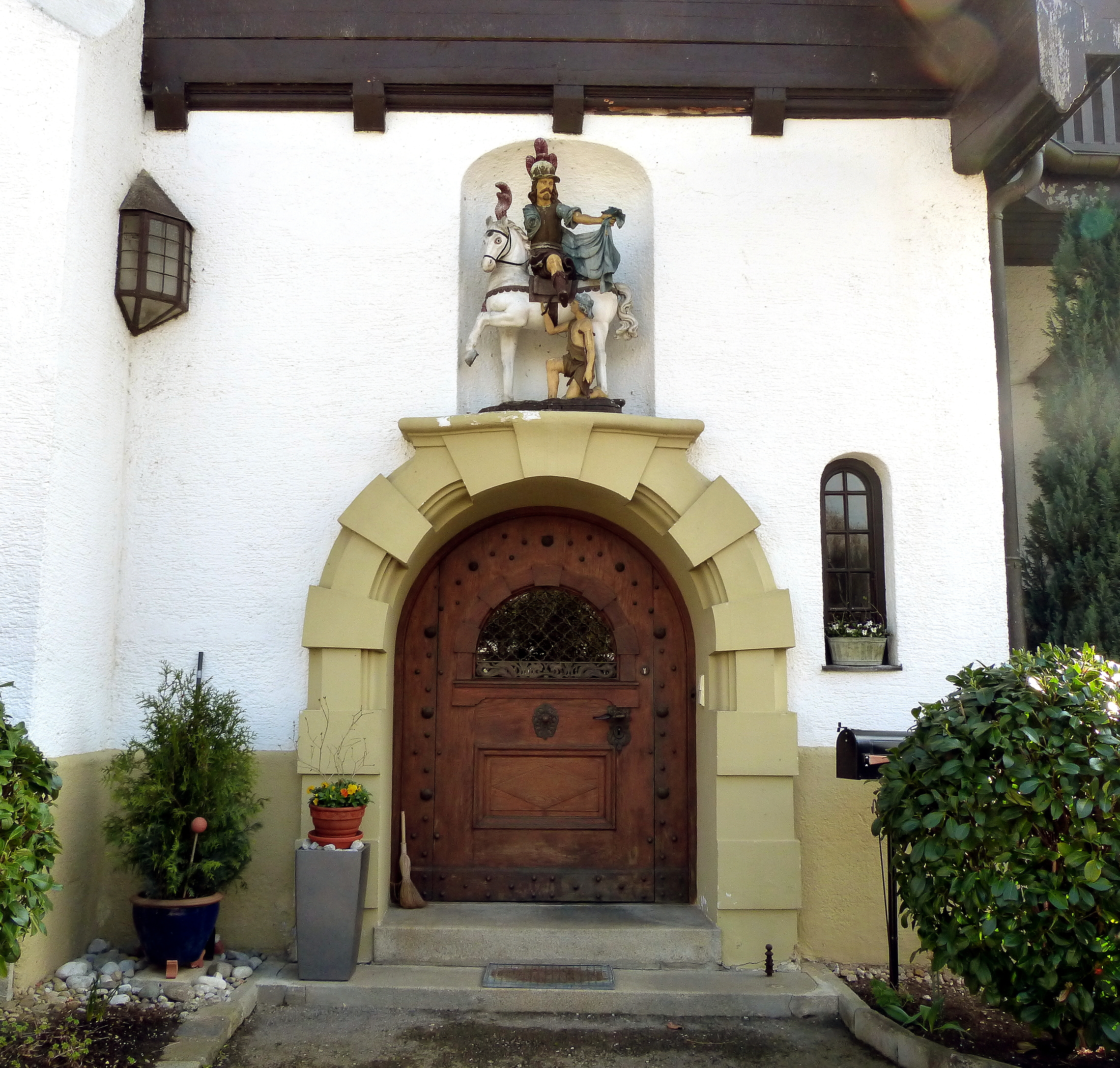 Berg am Starnberger See, OT Kempfenhausen, Münchner Straße 57. Eingangsportal des Direktorenhauses.